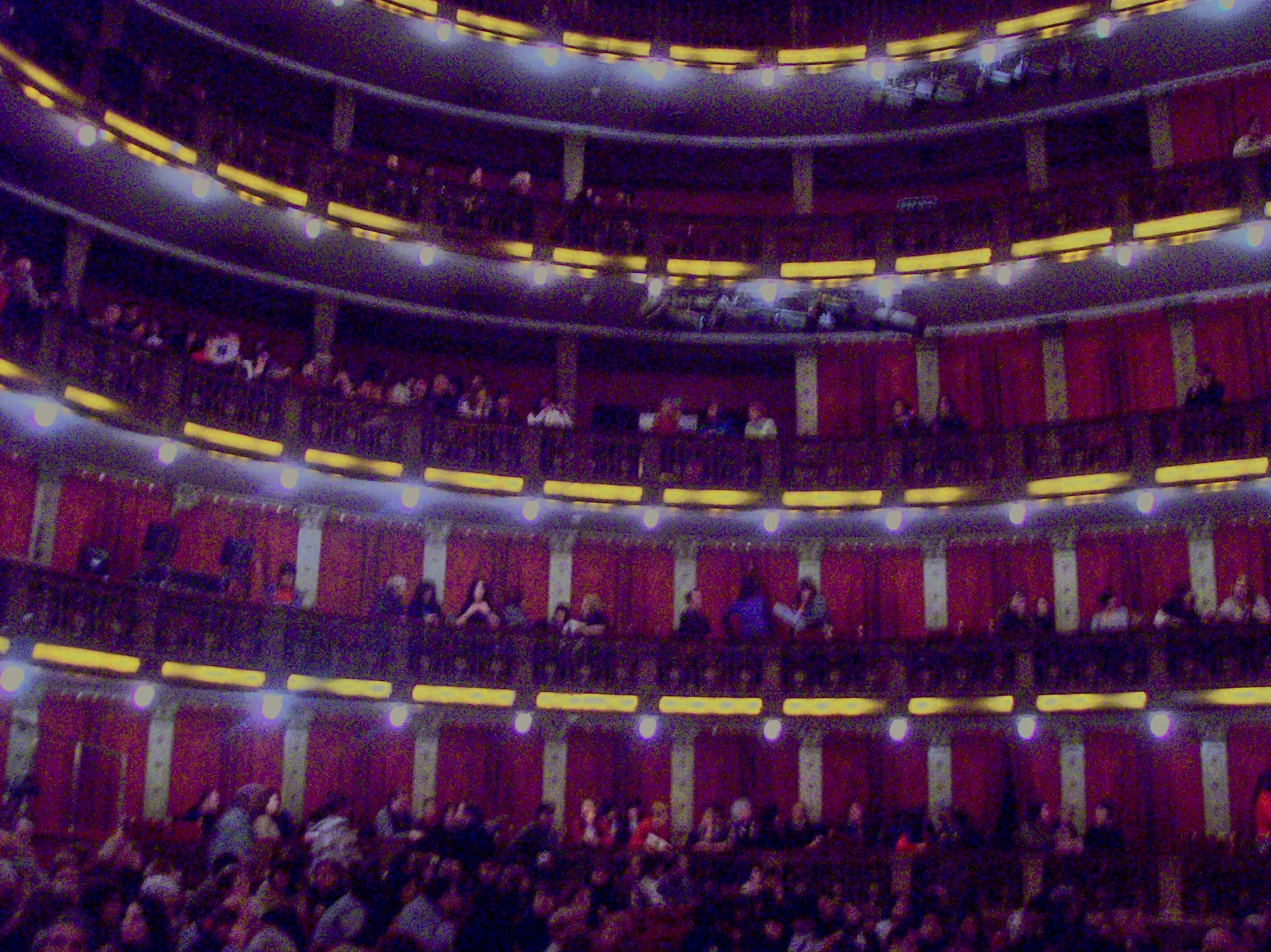 Teatro Nacional Cervantes, Buenos Aires, Argentina.